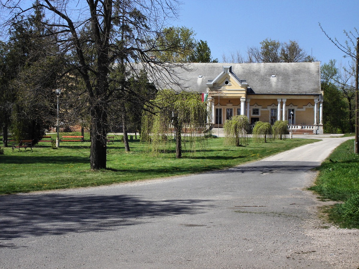 Zichyújfalu, kastélypark